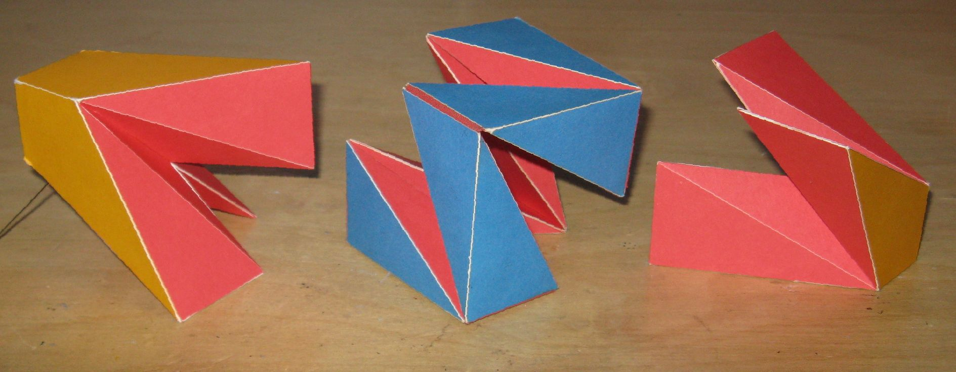 Umstülpbarer Würfel von Paul Schatz: Reduktion auf die Würfelkette (mittleres Teil)